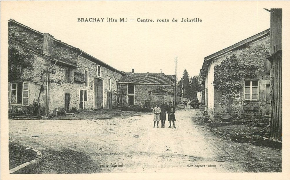 Le centre du village vers 1910.